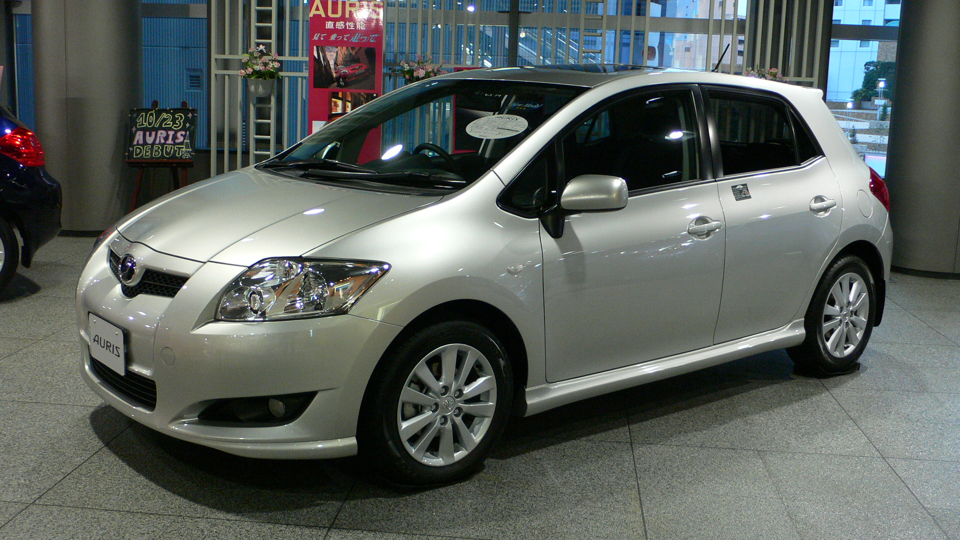 Toyota Auris (2006)